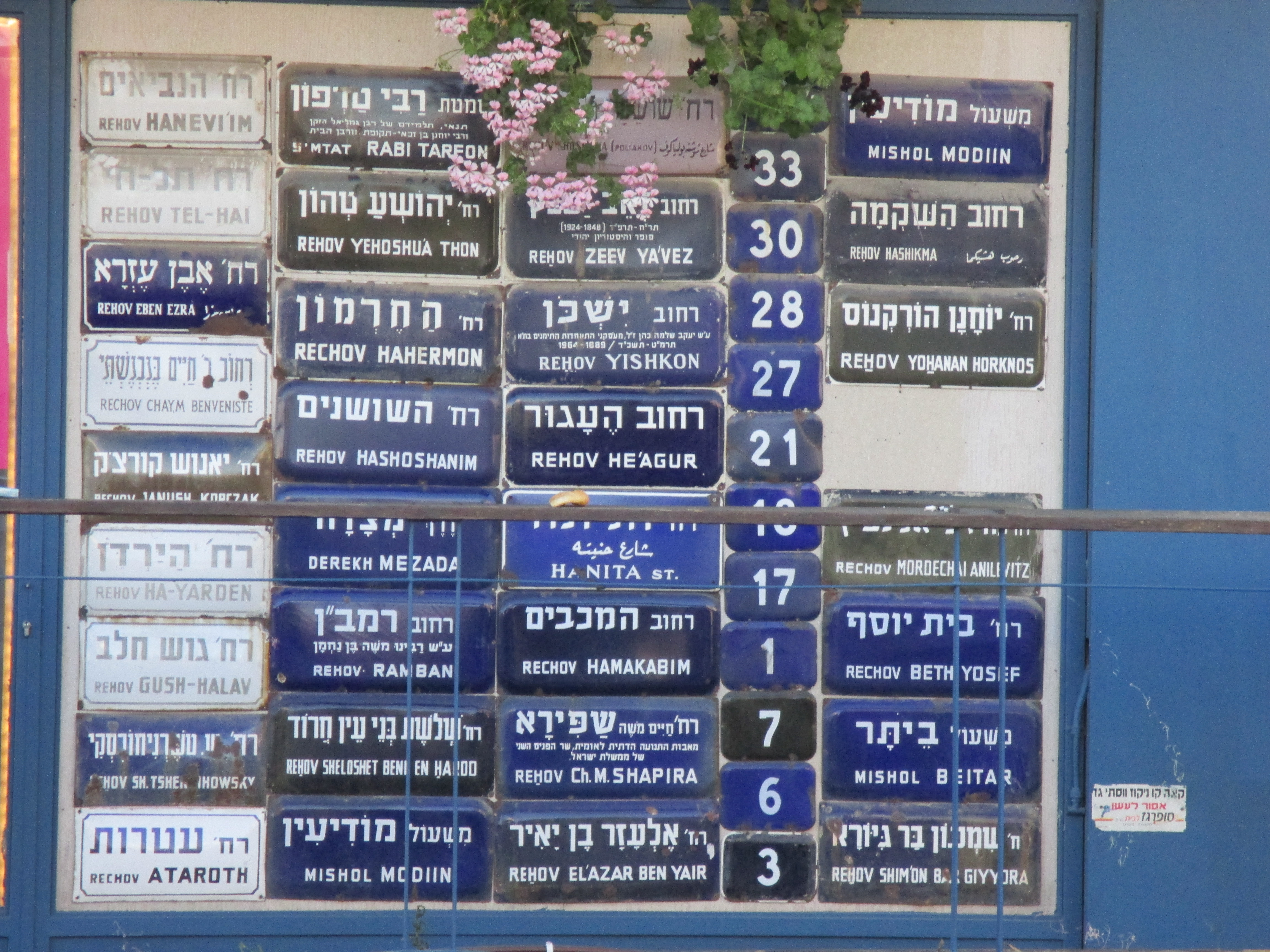 תצוגה של מגוון שלטי רחוב ברחוב אגריפס בירושלים